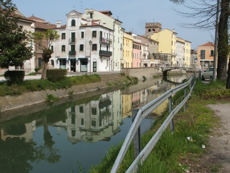 Lendinara: Riviera San Biagio e Adigetto.